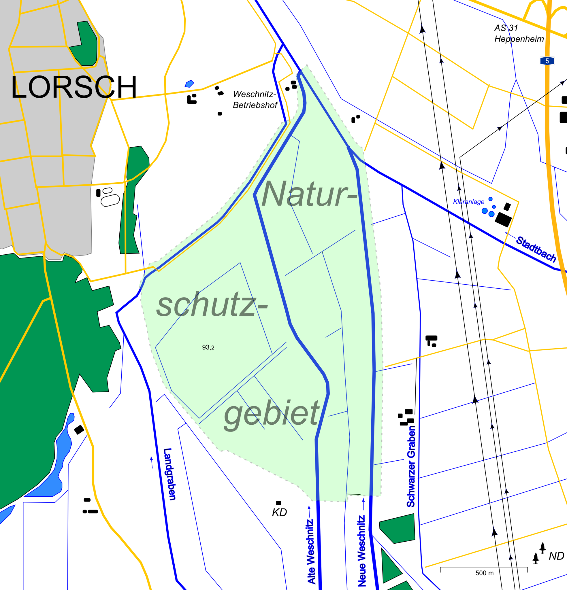 Karte des Naturschutzgebietes "Weschnitzinsel von Lorsch"